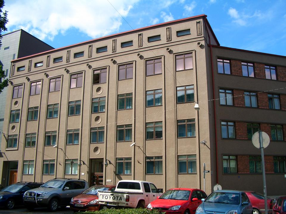 Sakala 2 // 4